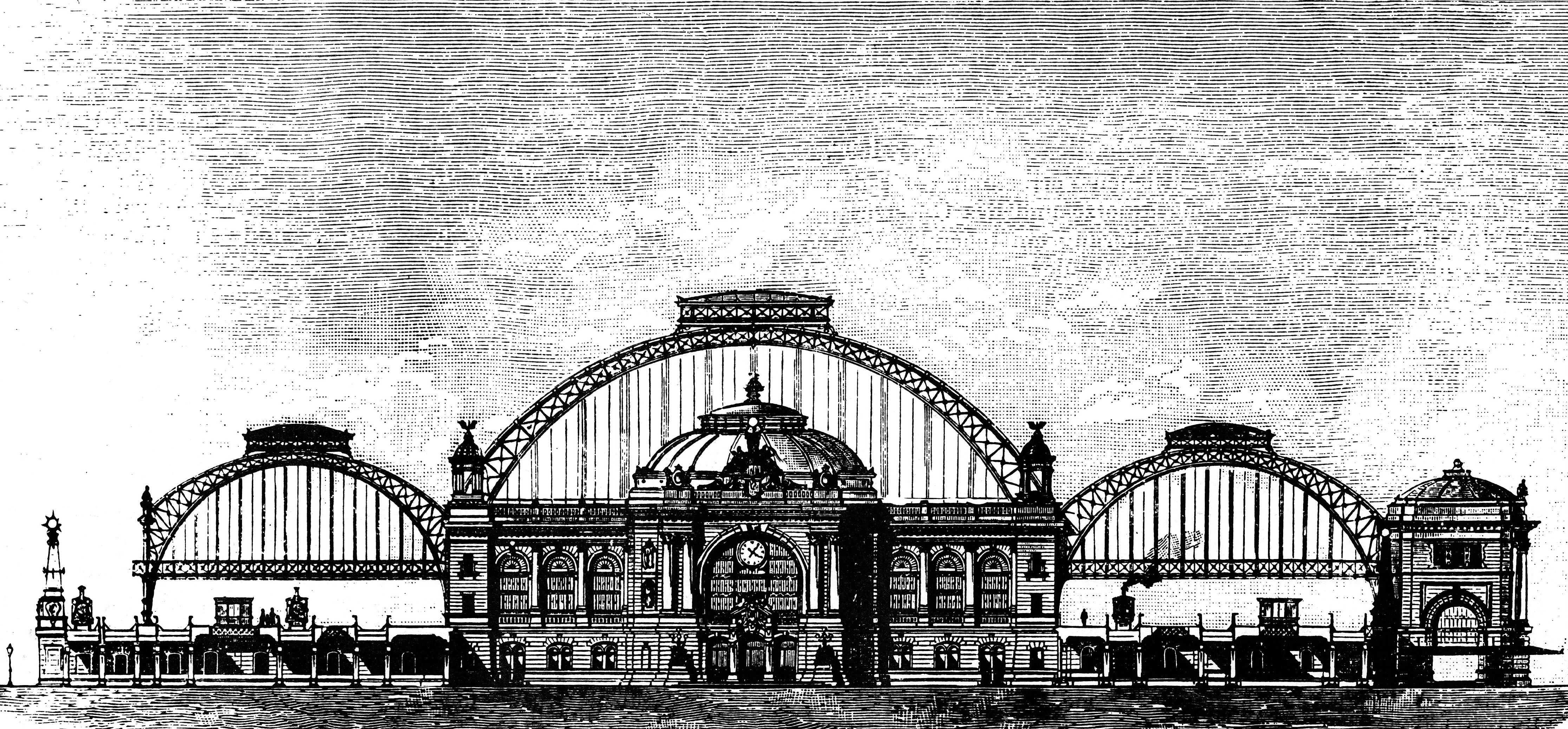 Entwurf zum Dresdner Hauptbahnhof (Wettbewerb 1892)